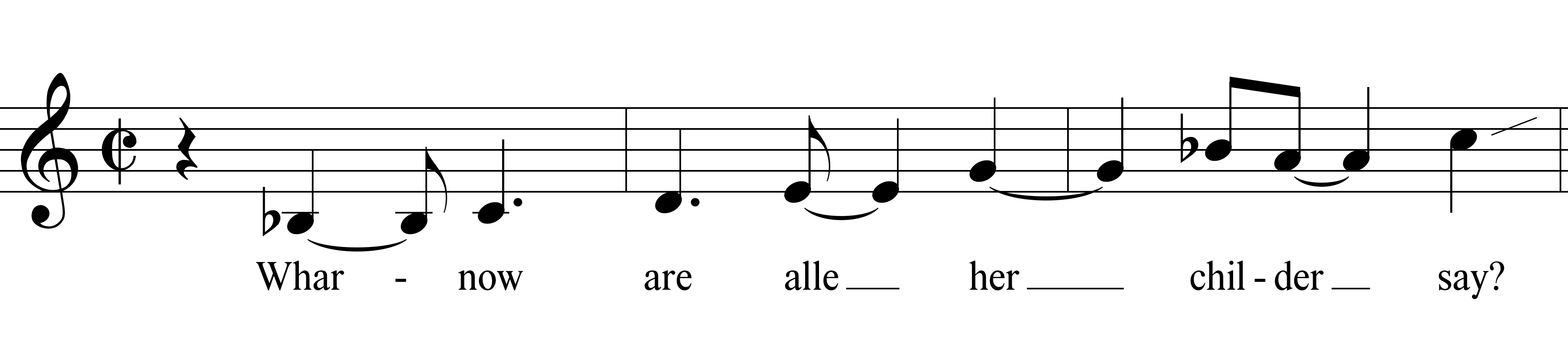 Extrait de la pièce XXIII d'Anna Livia Plurabelle d'André Hodeir